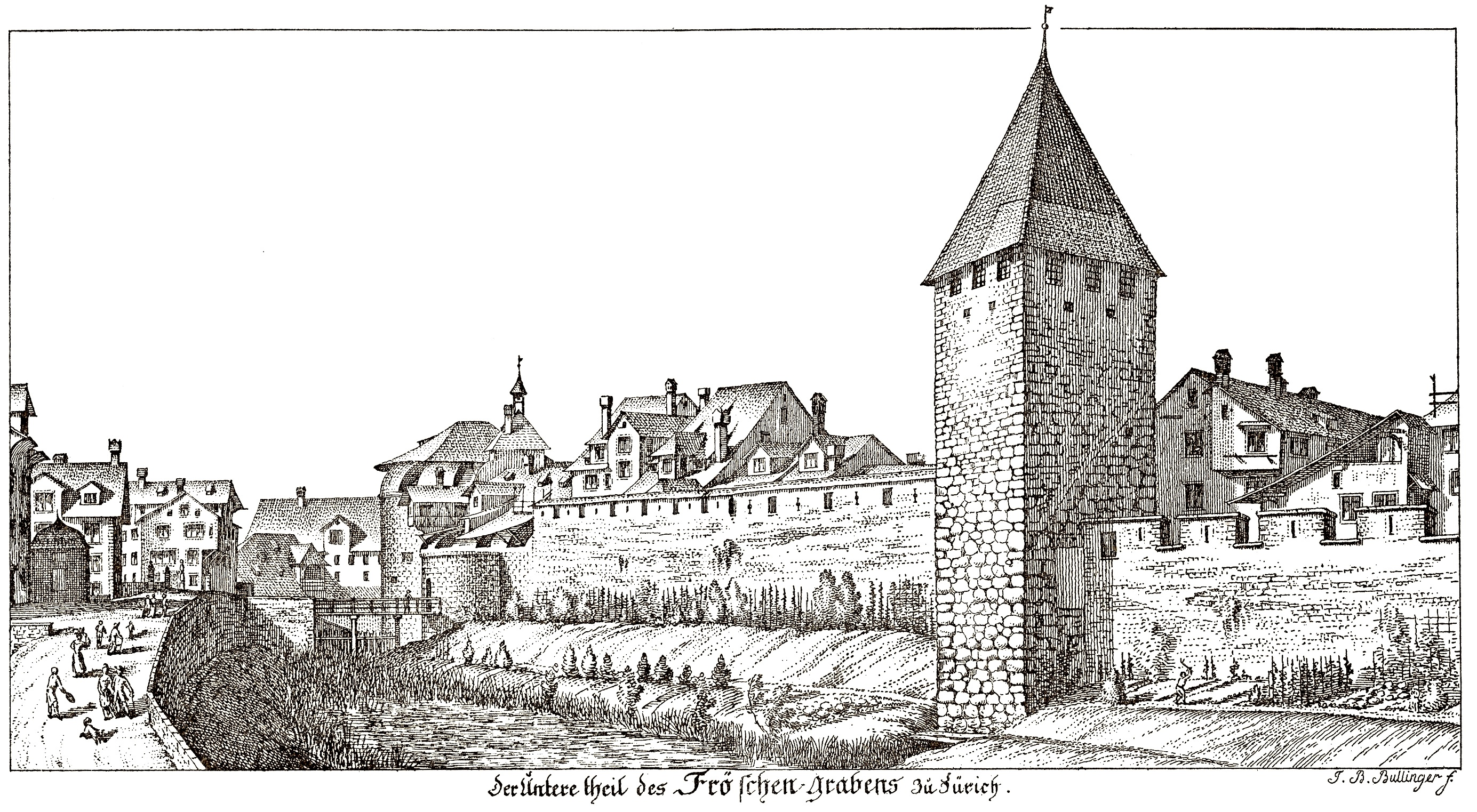 Der Fröschengraben auf einem Stich von Johann Balthasar Bullinger. Etwas links von der Mitte das Rennwegbollwerk und rechts der Kuttelturm.